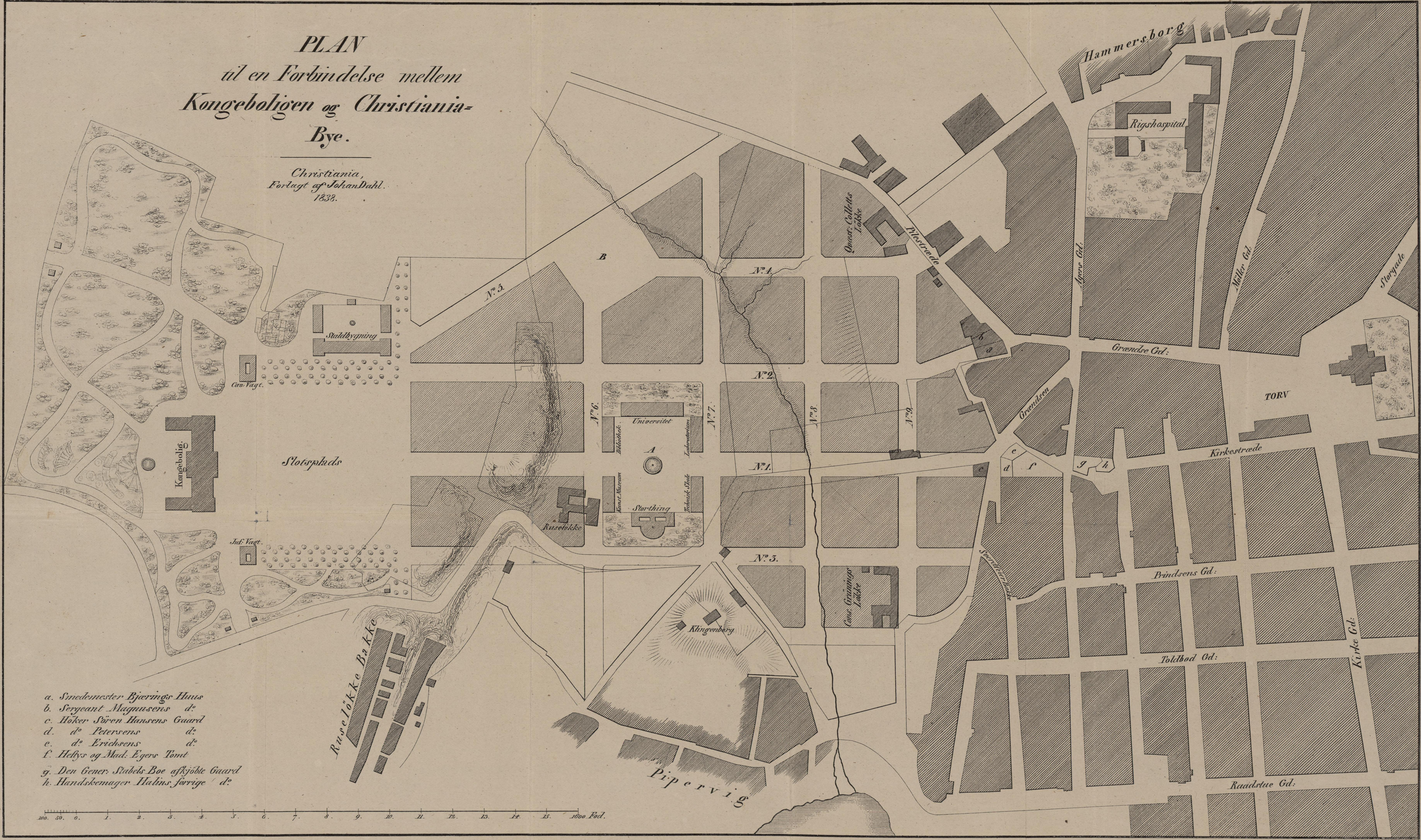 Illustrasjon hentet fra boken "Forslag angaaende en Forbindelse mellem Kongeboligen og Christiania Bye" av Linstow, Hans Ditlev Frants og utgitt av Johan Dahl (Christiania, 1838)